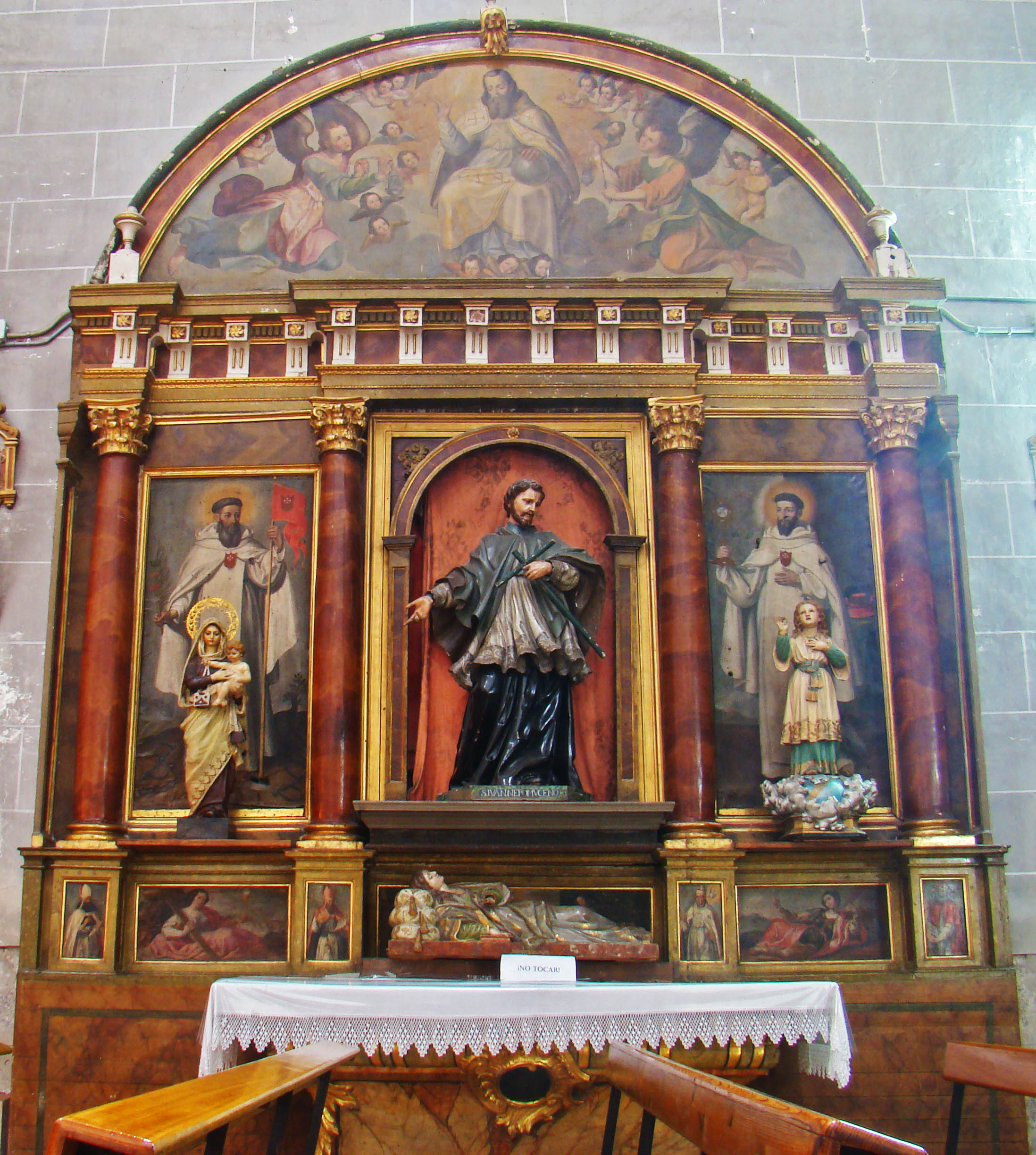 Retablo de San Juan Nepomuceno en la iglesia de la Magdalena de Valladolid, España. El retablo procede del convento de la Merced Calzada, a raíz de la Desamortización. Las pinturas son del taller del pintor Diego Valentín Díaz y representan a San Pedro Nolasco y a San Juan de Mata. La imagen del centro no corresponde al retablo.